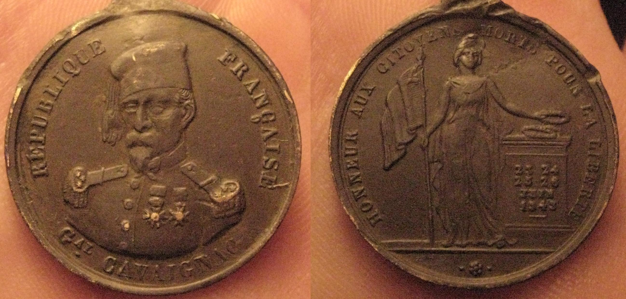 Médaille commémorative du générale Louis Eugène Cavaignac. Avers: Gal CAVAIGNAC - REPUBLIQUE - FRANCAISE Revers : HONNEUR AUX CITOYENS MORTS POUR LA LIBERTE